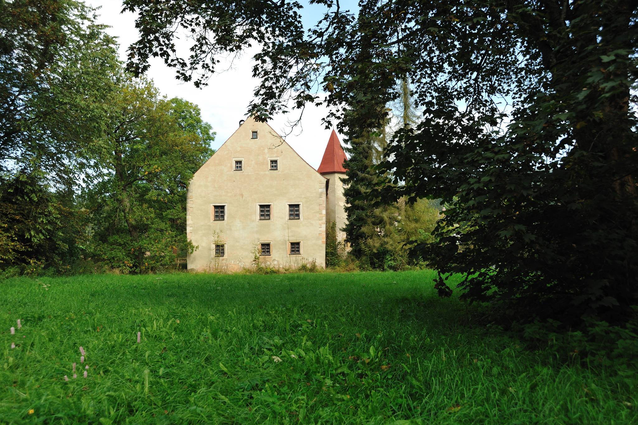 Hammerschloss an der Fichtelnaab hinter ErbendorfThis is a photograph of an architectural monument.